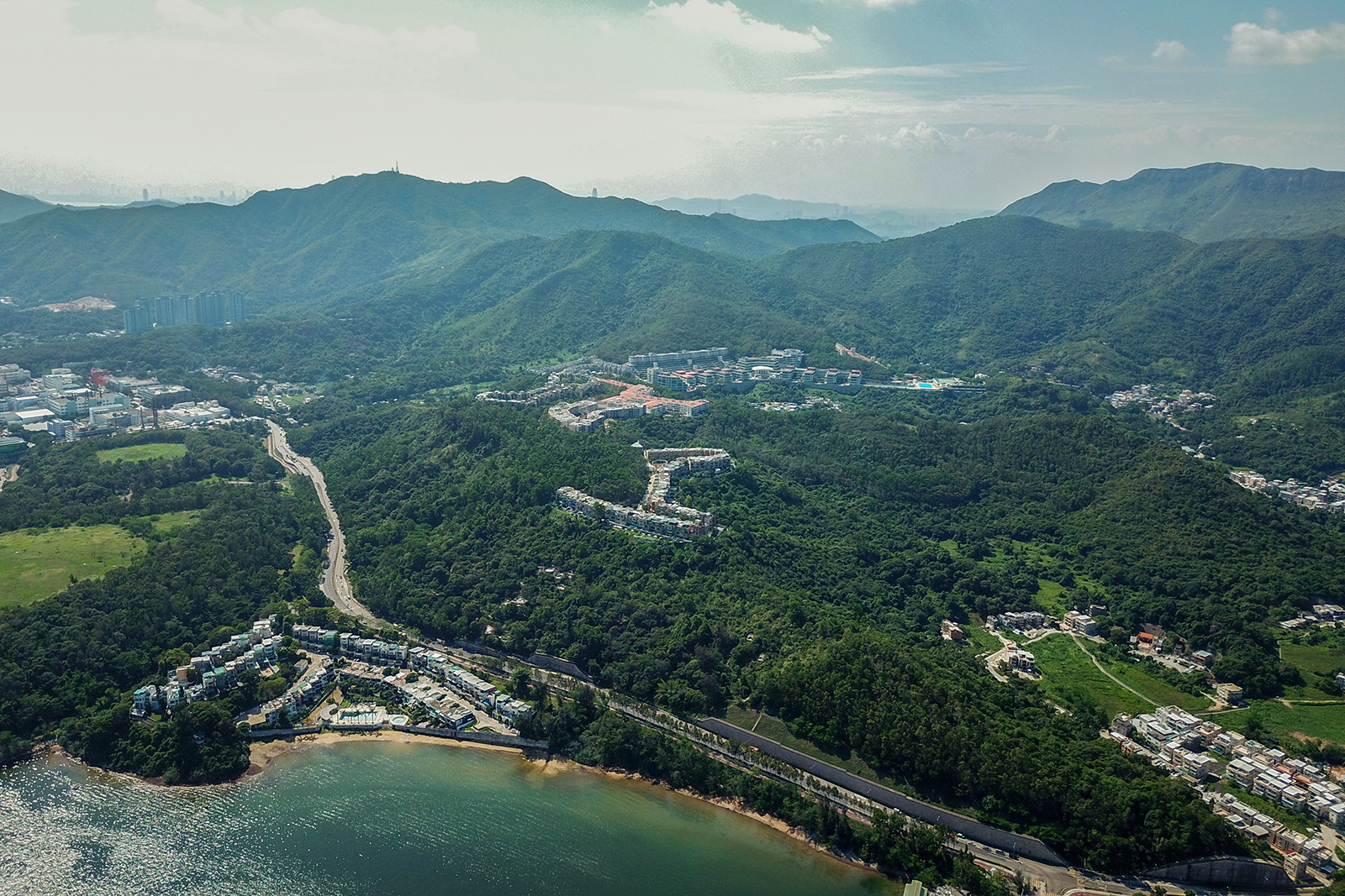 Tung Tsz